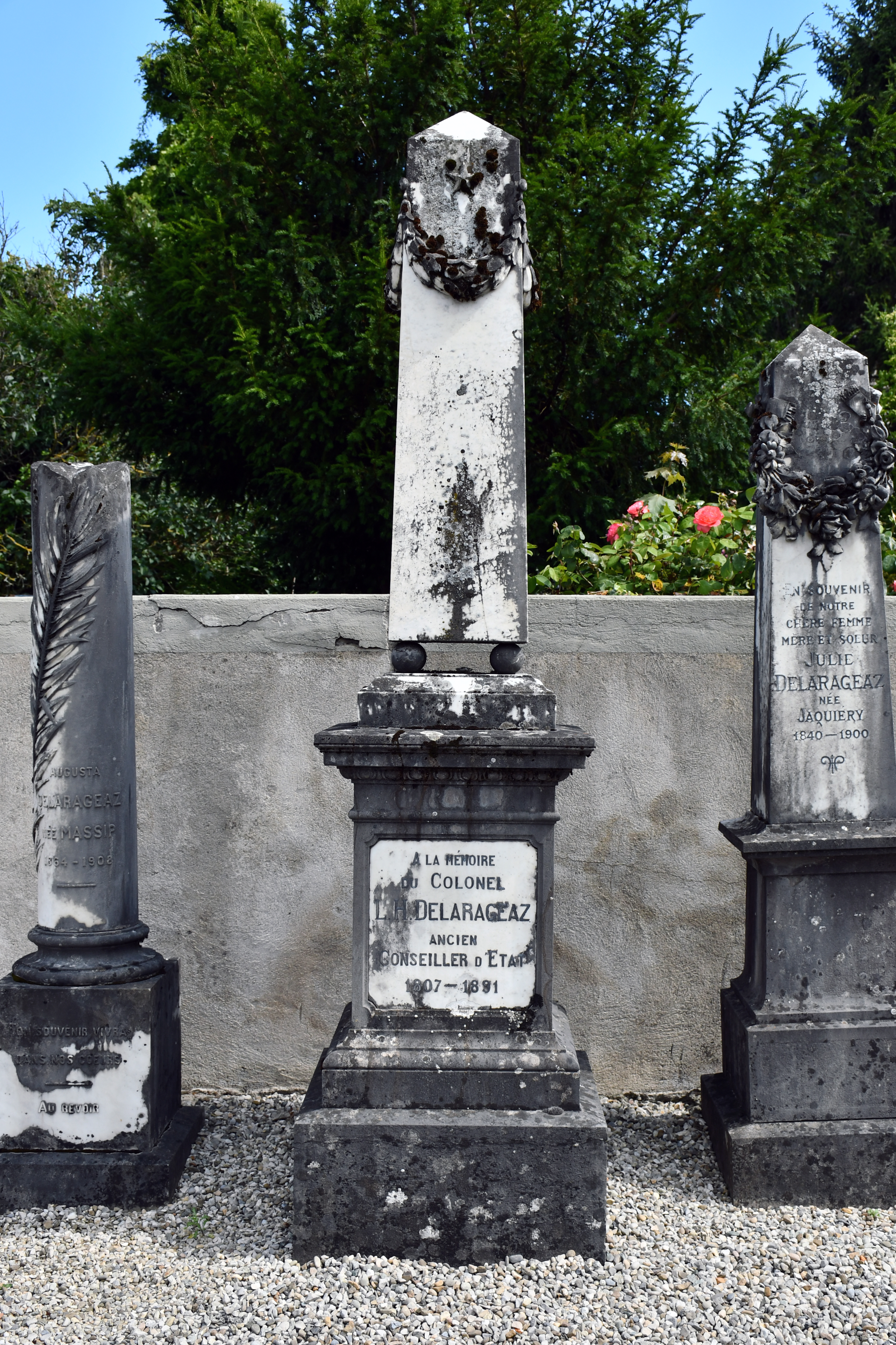 Monument à Louis-Henri Delarageaz, personnalité politique et militaire suisse, dans le cimetière de Préverenges (Suisse).